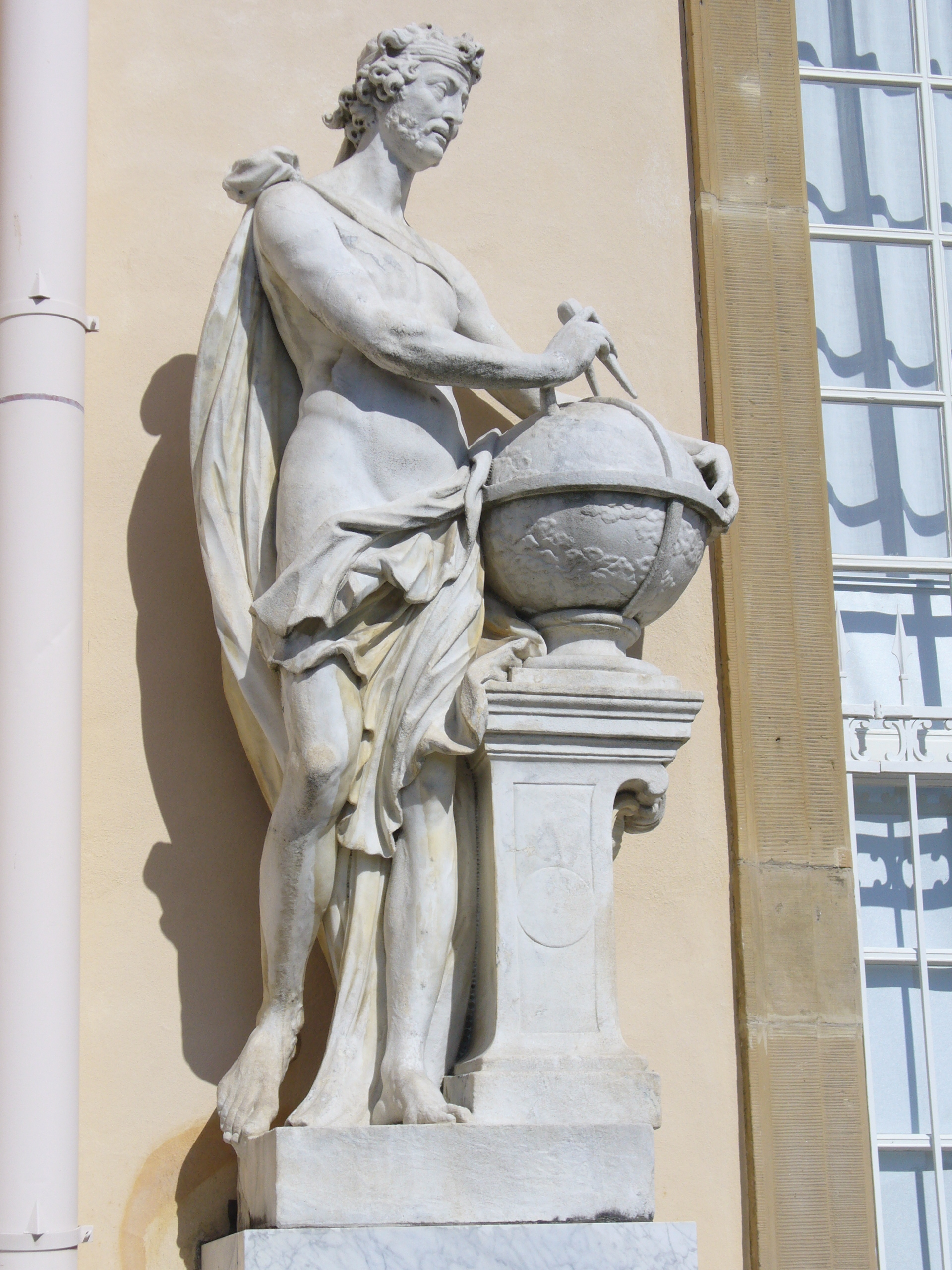 männliche Figur mit Globus und Messinstrumenten, Allegorie der Geographie (Geometrie)